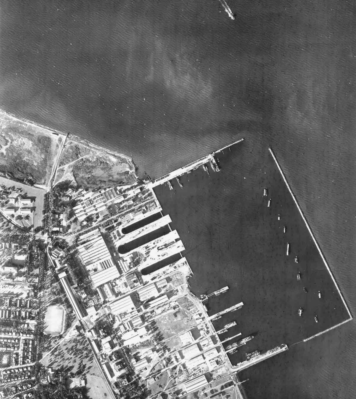 Vue aérienne de l'arsenal de Sidi-Abdellah à Menzel Bourguiba (Tunisie)